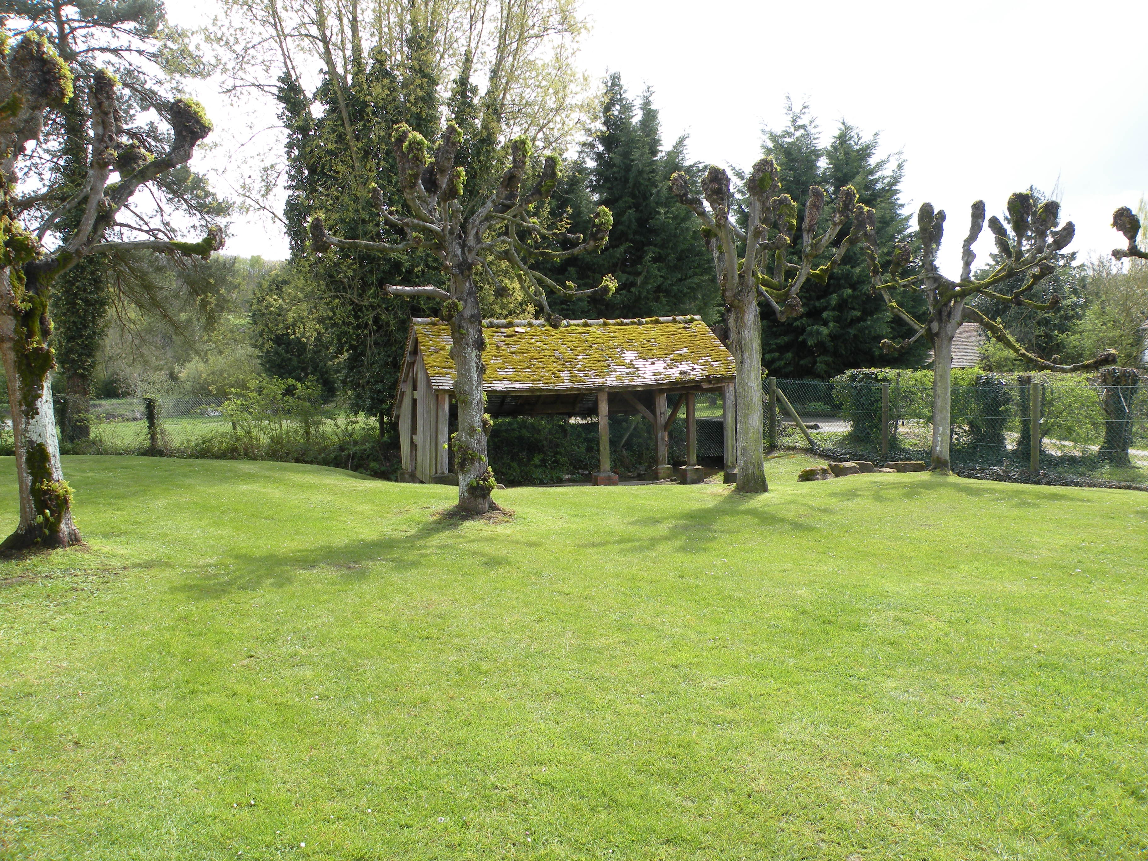 lavoir à cotée de l'église Senots